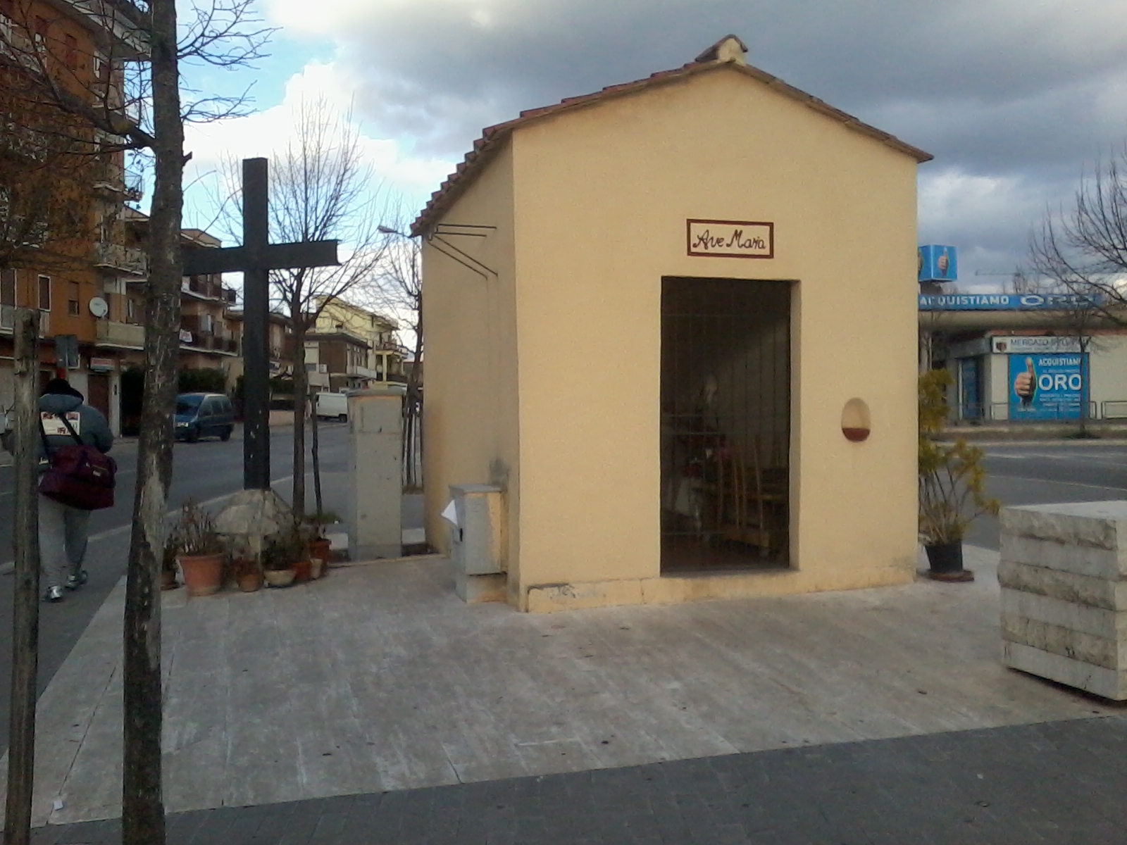 La cappella dell'Annunziata a Cisterna di Latina